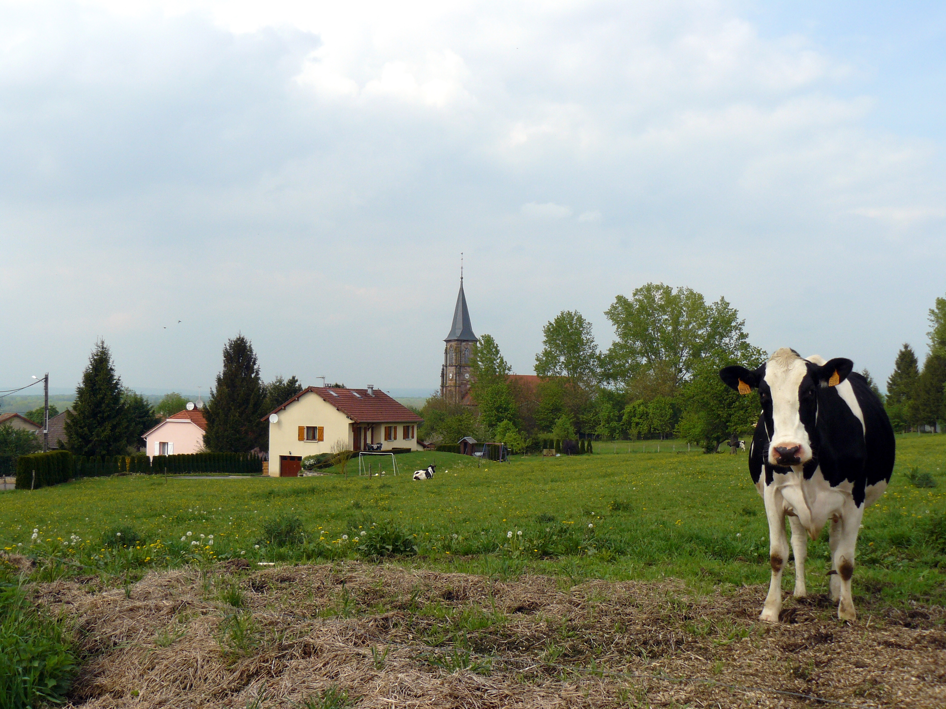 Vue de Dambenoît-lès-Colombe (Haute-Saône, France)